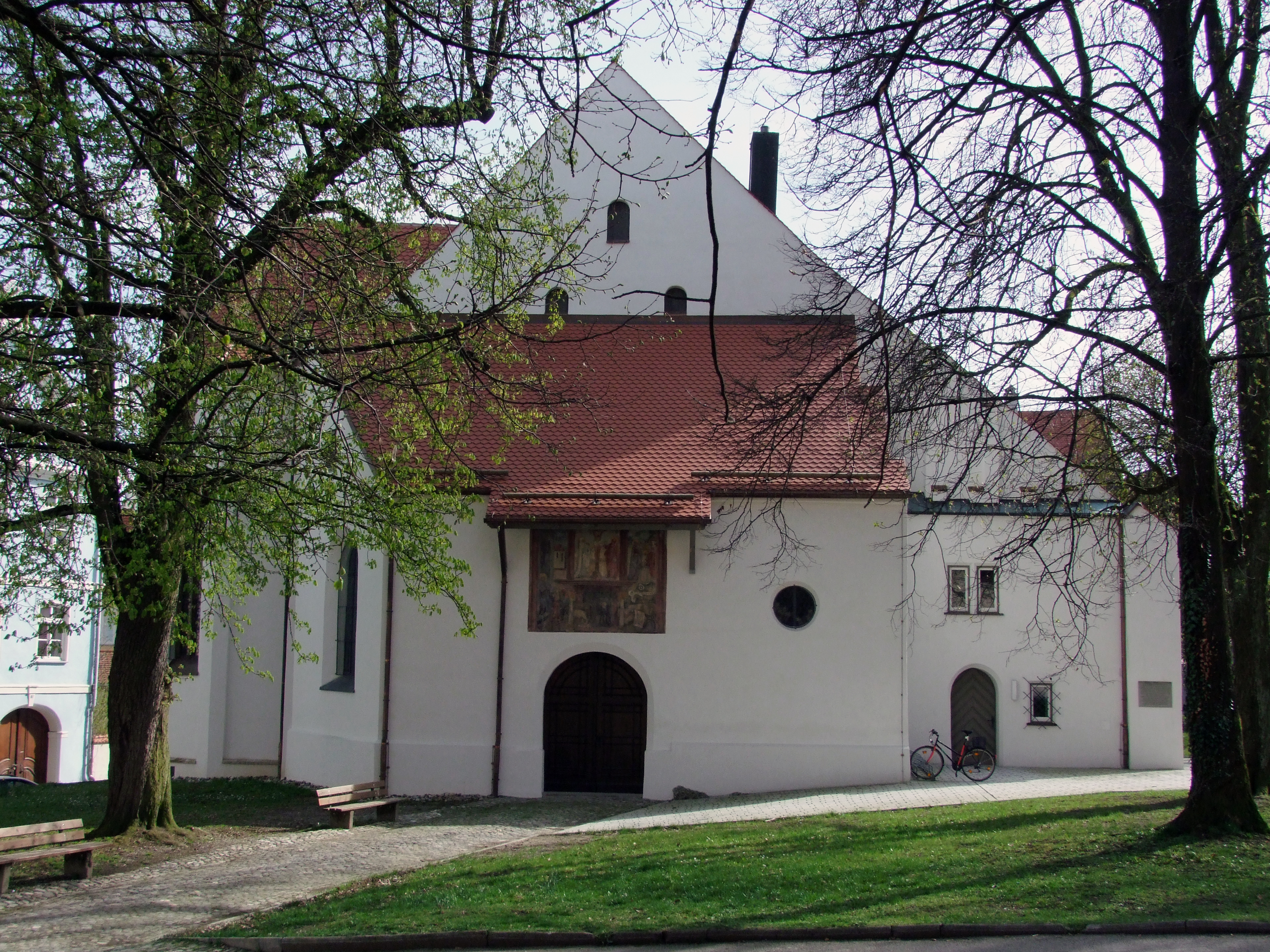 Kinderlehrkirche nach der Sanierung im oberschwäbischen Memmingen.